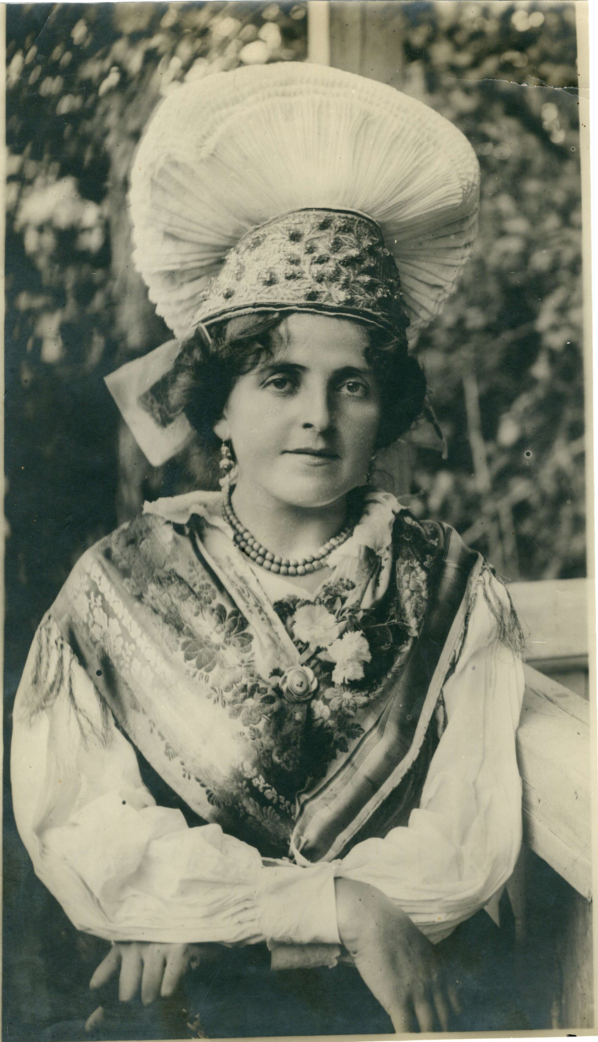 Gorenjska narodna noša.